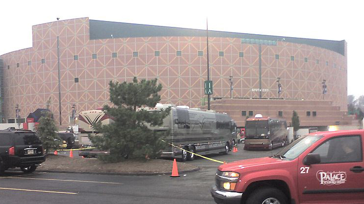 The Palace of Auburn Hills auteur : dykstranet